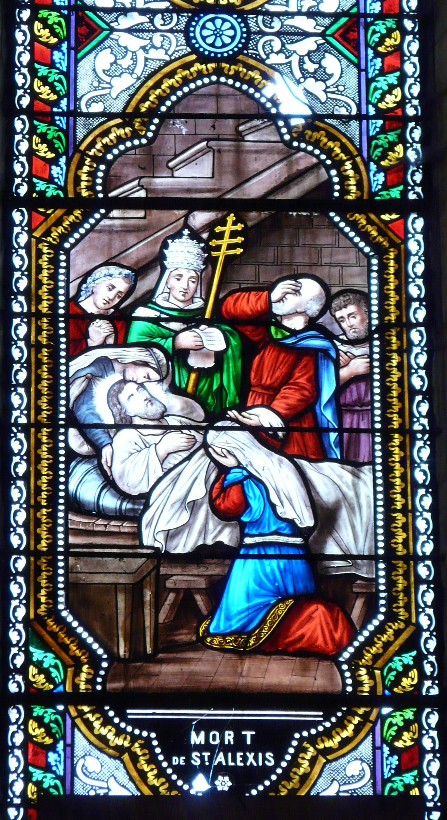 Représentation de la mort de saint Alexis, détail d'un vitrail de l'église Saint-Sulpice du Bugue, Dordogne, France.